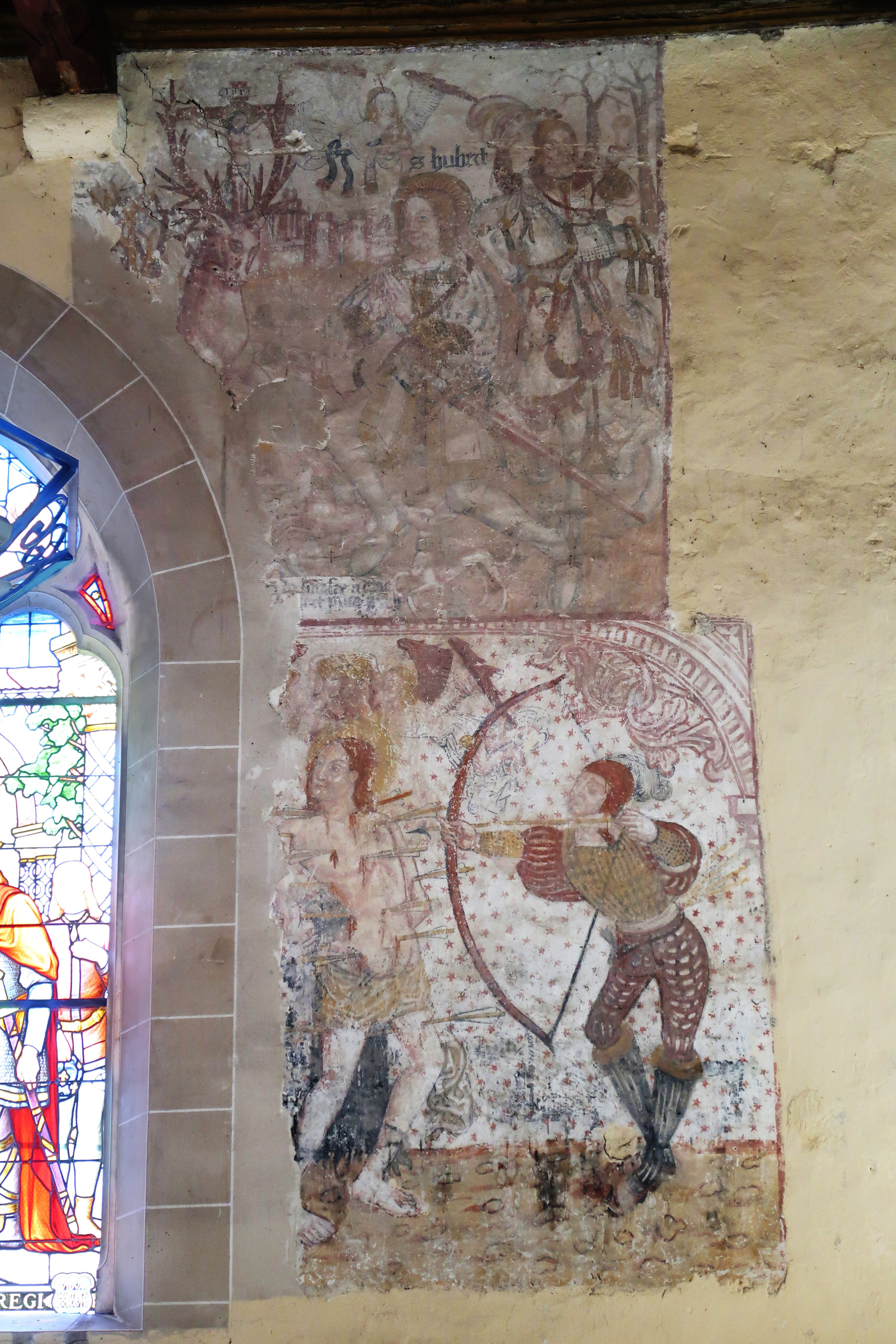 La Selle-sur-le-Bied : peintures murales du XVème siècle sur le mur sud de l'église.